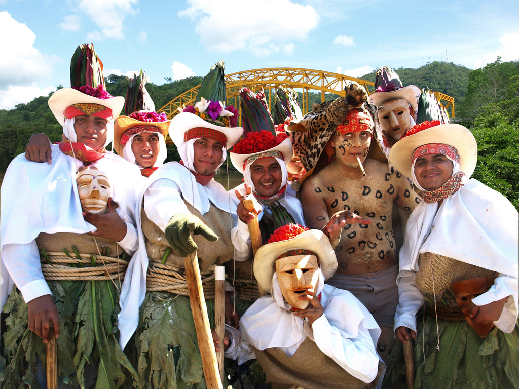 Participantes de la danza del Pochó, que se realiza cada año durante el carnaval, en el municipio de Tenosique, Tabasco.